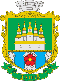 Герб смт Дашів